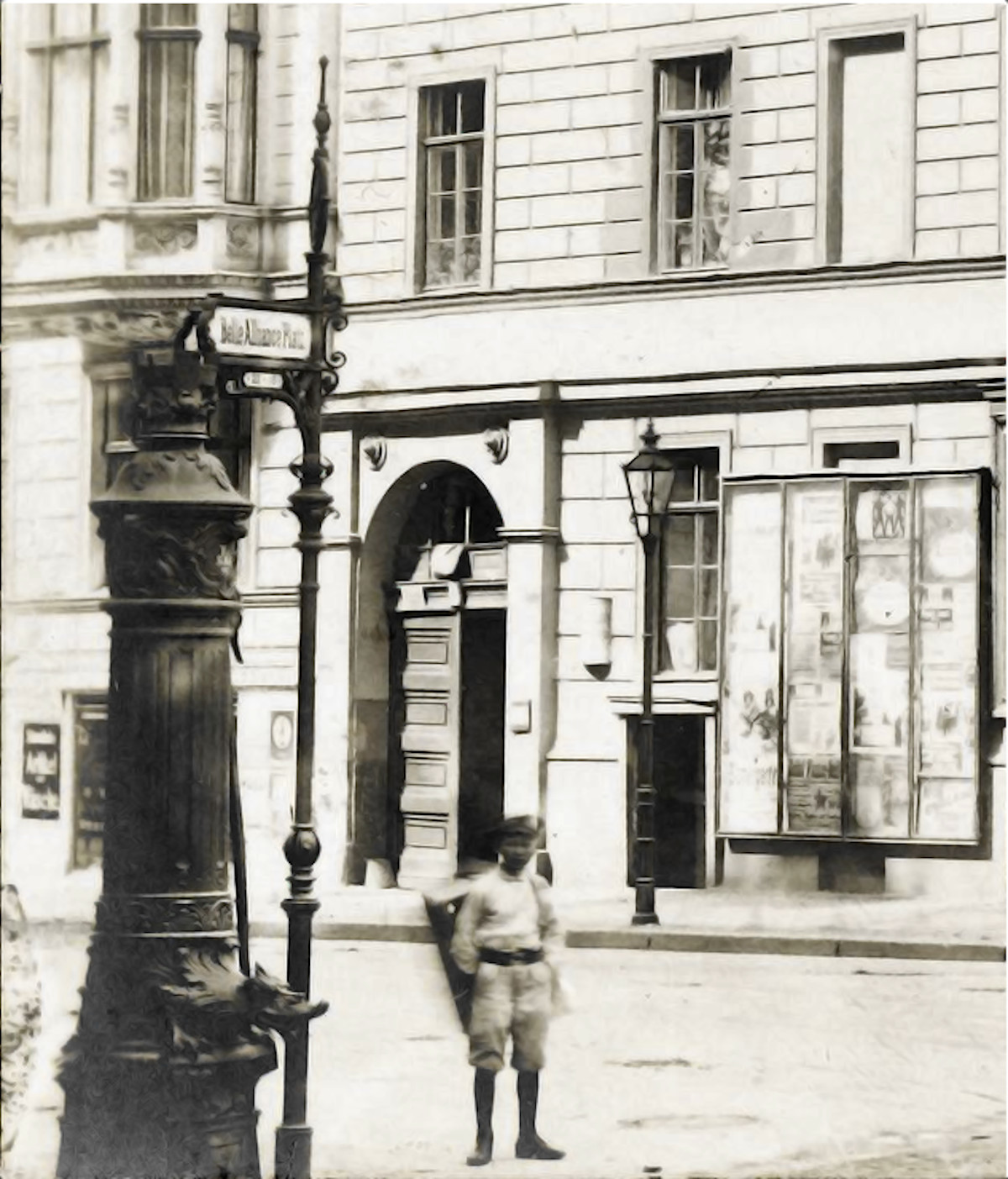 Das Bild ist ein Ausschnitt aus der Fotografie Belle-Alliance-Platz 14, Ecke Wilhelmstraße 1 von Hugo Rudolphy (1855-1919), Abmessungen: Bildmaße H: 12 cm B: 17,5 cm Datierung Berlin, 1900~ mit der Inventarnummer IV 64/3341 V. Dargestellt ist der Lauchhammerbrunnen Typ, der auf dem Bild links unten vor dem Eckgebäude Wilhelmstraße 148 Südwest zu Belle-Alliance-Platz 15 stand. Etwa an der Stelle: 52° 29′ 56.65″ N, 13° 23′ 25.61″ E bzw. 52.499068°, 13.390447°